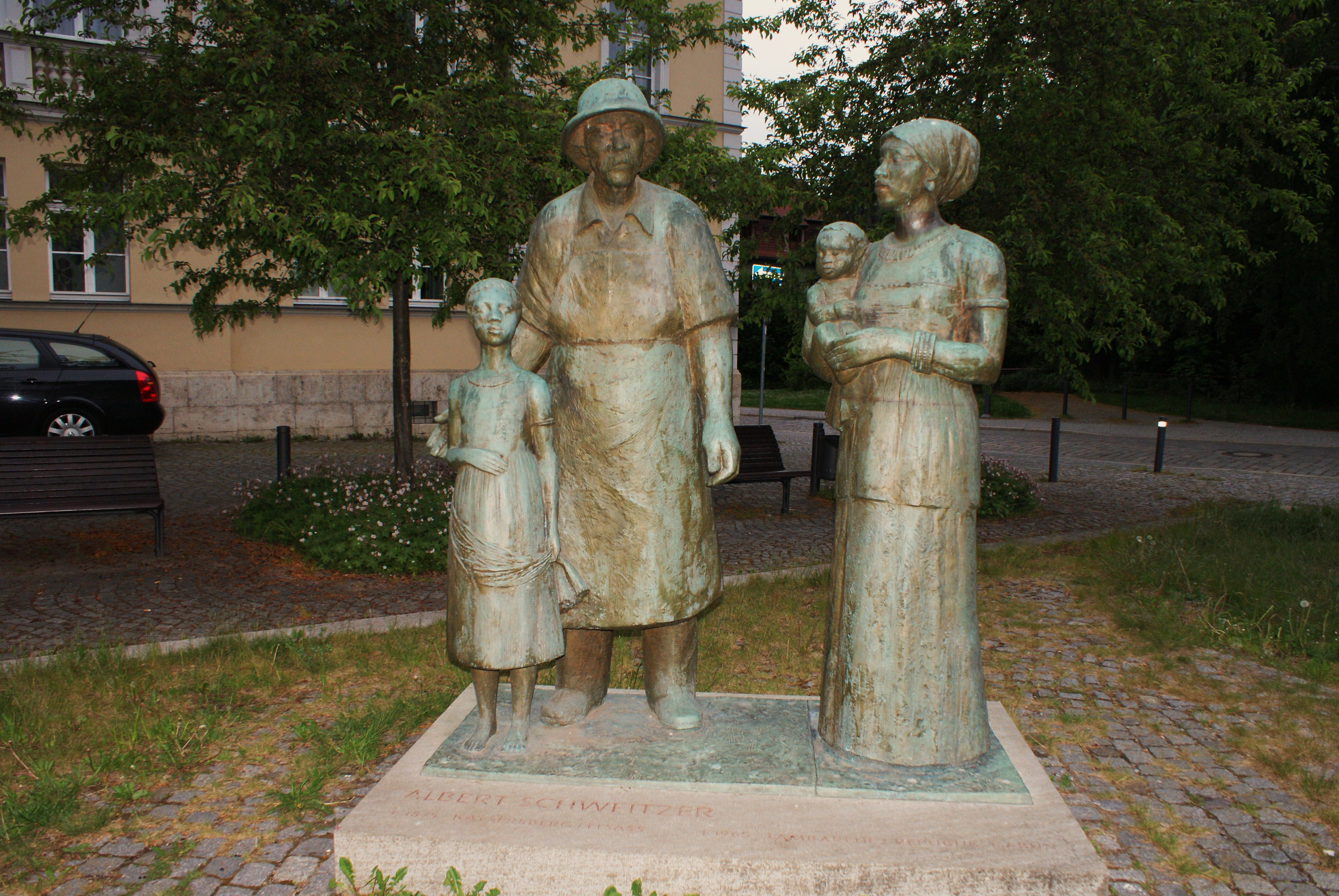 Figur Albert Schweitzers in Weimar